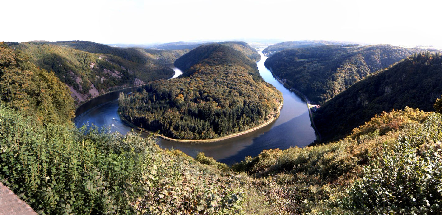 Saarschleife bei Mettlach (river Saar at Mettlach, Germany)